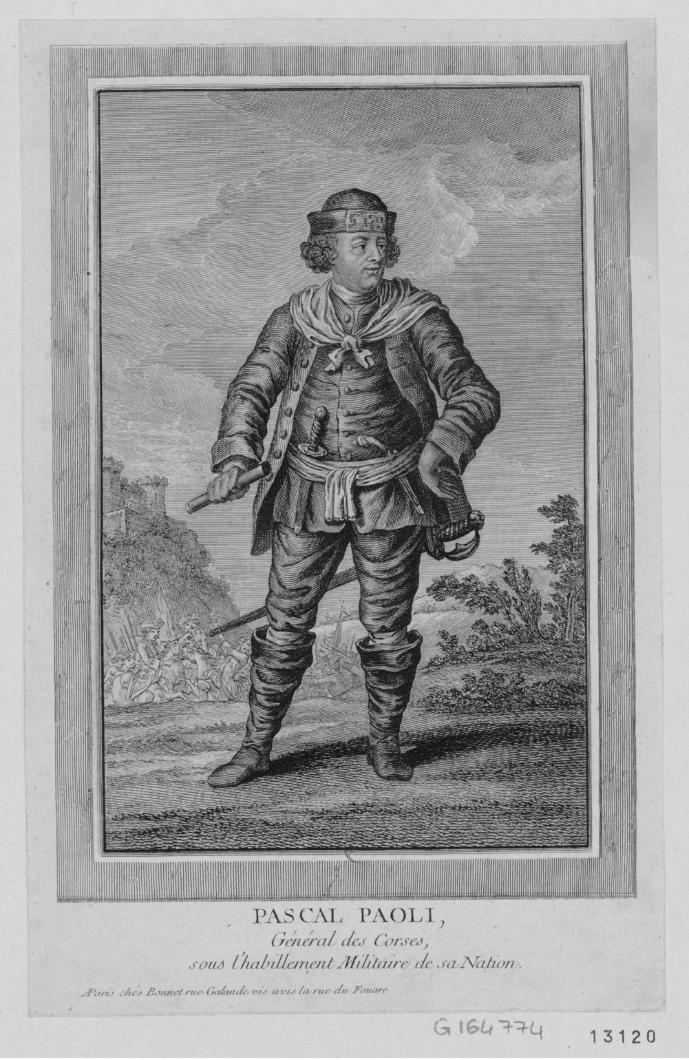 Portrait de Pasquale Paoli (1725-1807), en pied. Pascal Paoli, Général des Corses, sous l'habillement militaire de sa nation, C, A Paris, chés Bonnet, rue Galande, vis-à-vis la rue Fouare.